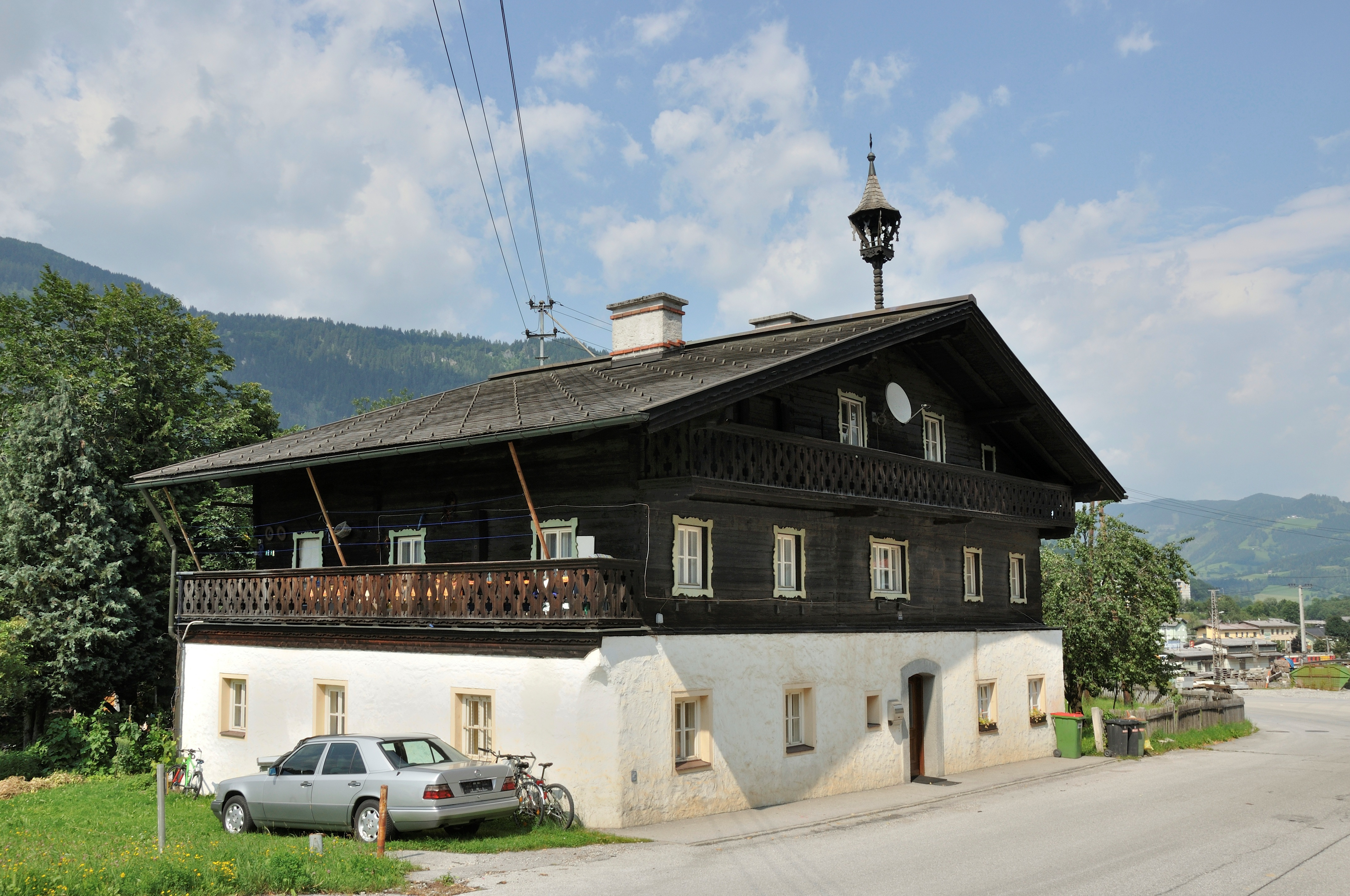 Bauernhaus, Urfahrgut